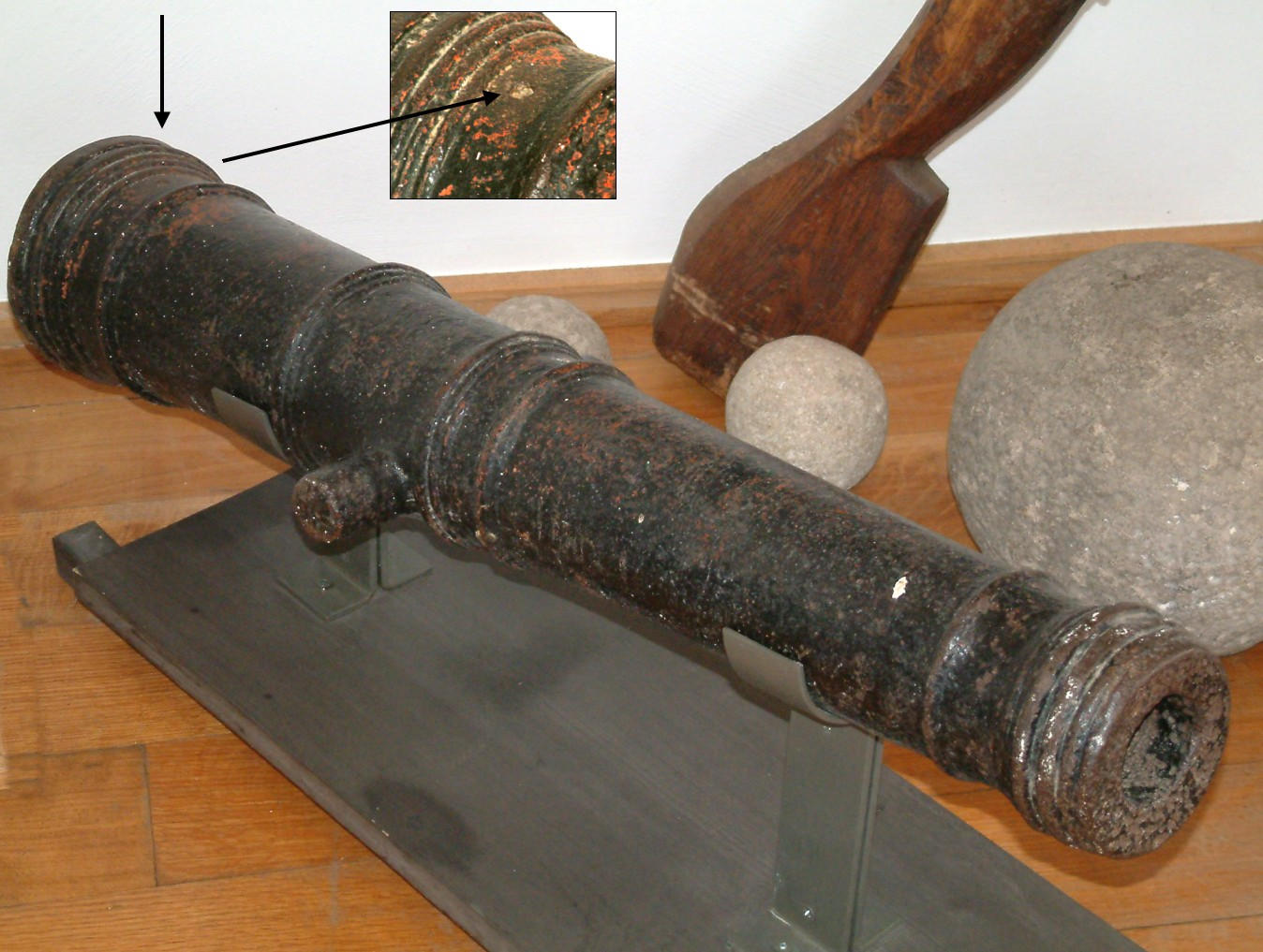 Mittelalterliche Kanone Typ Feldschlange; Ausschnittsbild zeigt vergrößert das Zündloch auf der Oberseite. / Medieval cannon type culverin.